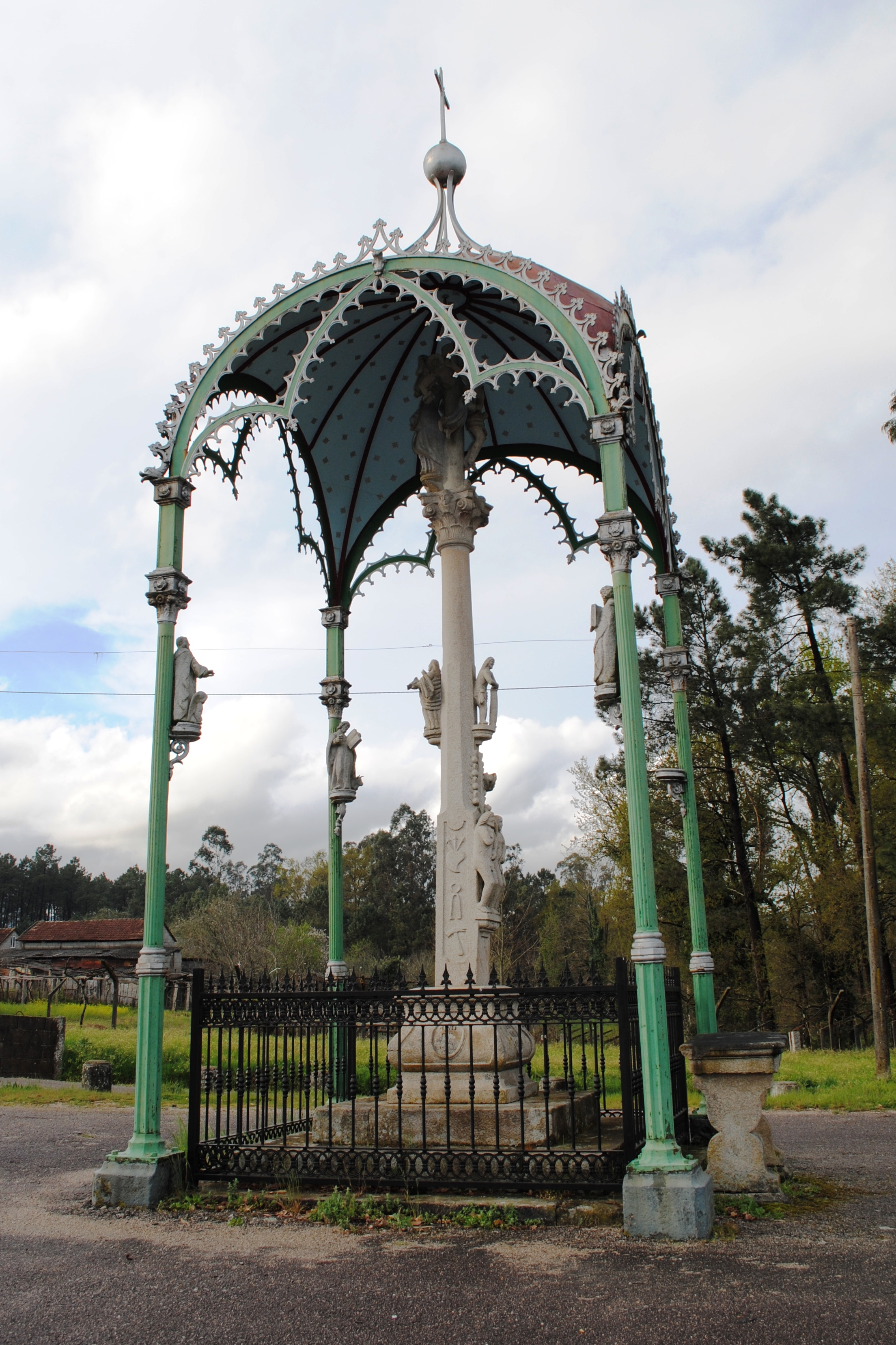 Cruceiro, Ribadetea, Ponteareas.